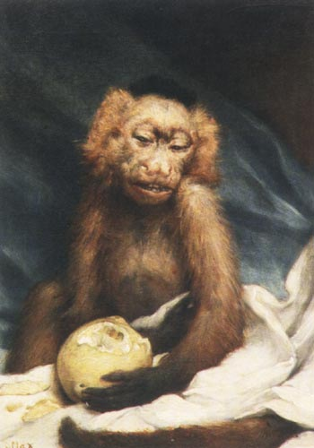 Äffchen mit Zitrone